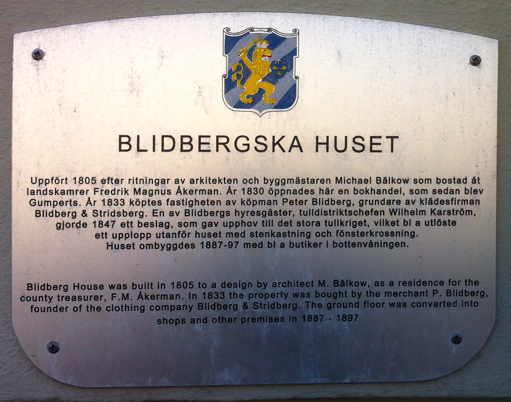 Åkermanska-Blidbergska huset från 1809. Det är beläget vid Södra Hamngatan 25, Korsgatan 2-6 och Drottninggatan 24 i centrala Göteborg. Plaketten sattes upp som en del av Göteborgs stads kulturnämnds "Projekt Husmärkning" kring åren 2000-2001 där drygt etthundra skyltar ingick. Se även boken "100 utmärkta hus i Göteborg". Vid en inventering av kommunen gjord 2016 satt 69 skyltar fortfarande uppe.